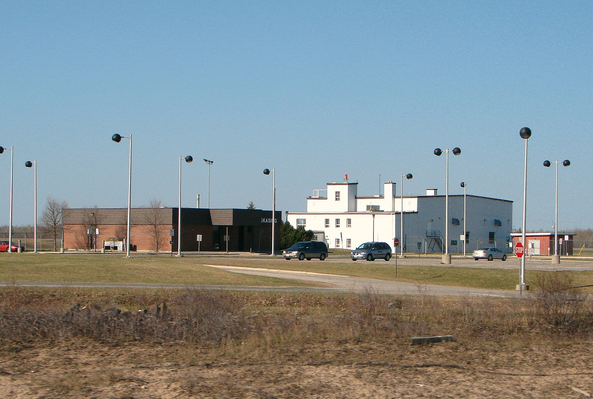 Kapuskasing Airport, Ontario, Canada